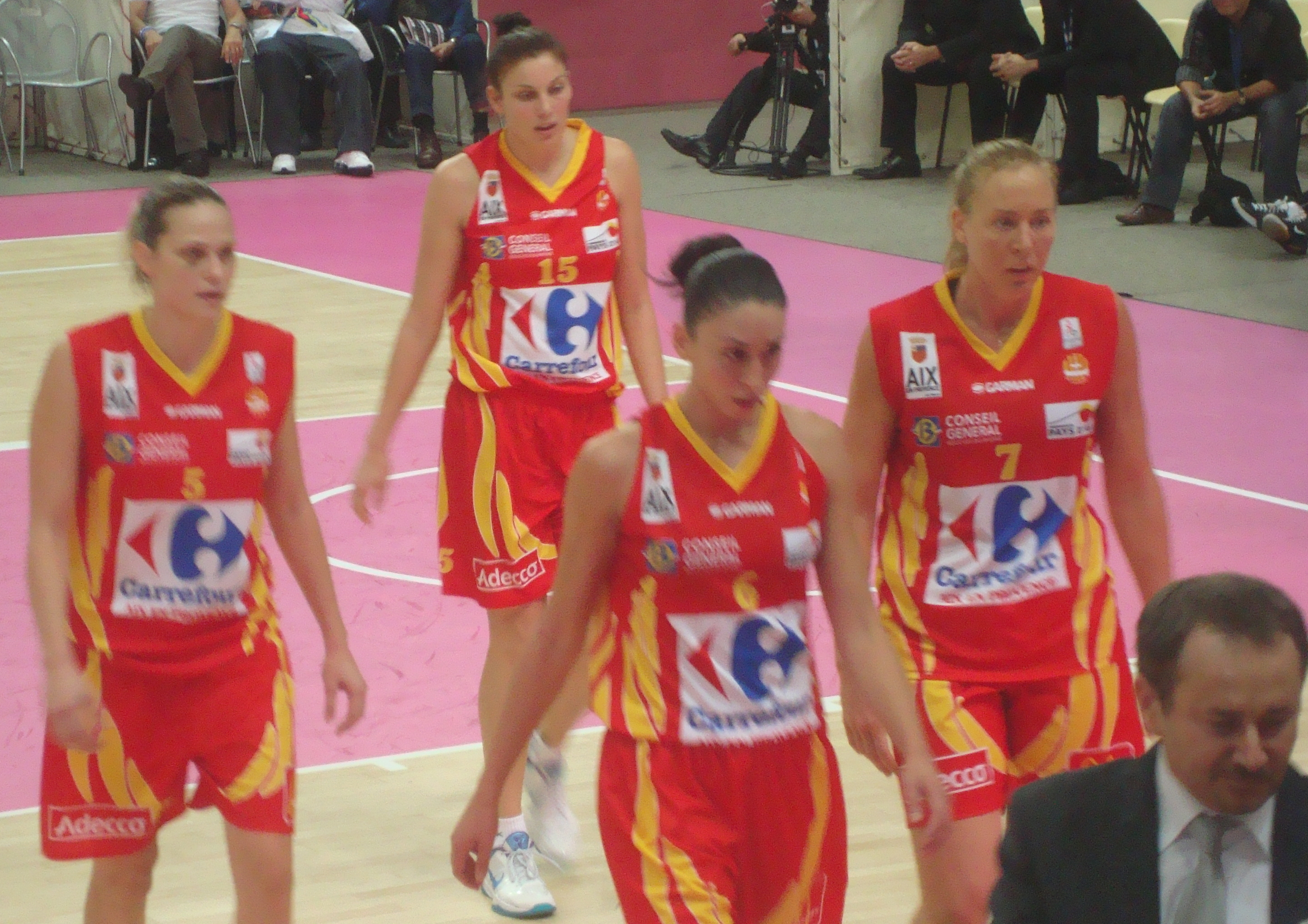 Les basketteuses d'Aix Claire Tomaszewki, Hollie Grima, Zoi Dimitrakou, Lauren Neaves (de gauche à droite) et l'entraîneur Emmanuel Coeuret lors de l'Open LFB 2010.